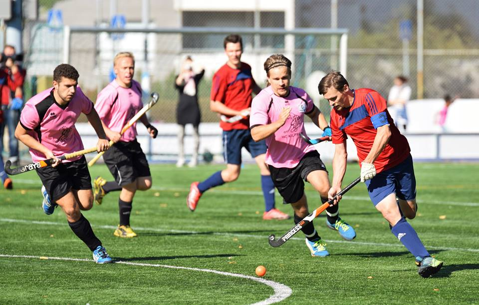 Maahockeyn SM-sarjan ratkaiseva 2.finaaliottelu. HC Kilppari vs. United 13.9.2015 Parkin kenttä, Turku